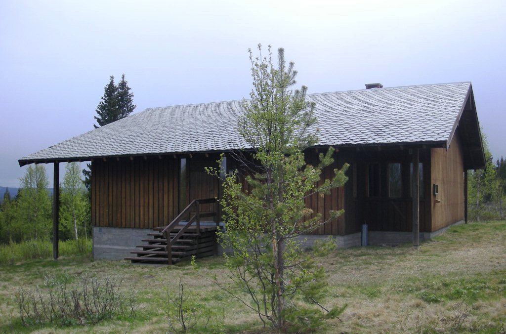 Veståskapellet (også kalt Veståsen fjellkirke) i Sør-Aurdal